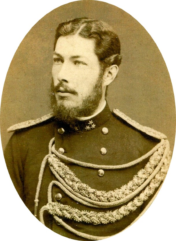 Evžen Vratislav z Mitrovic (1842 - 1895), Rakouský šlechtic a politik.